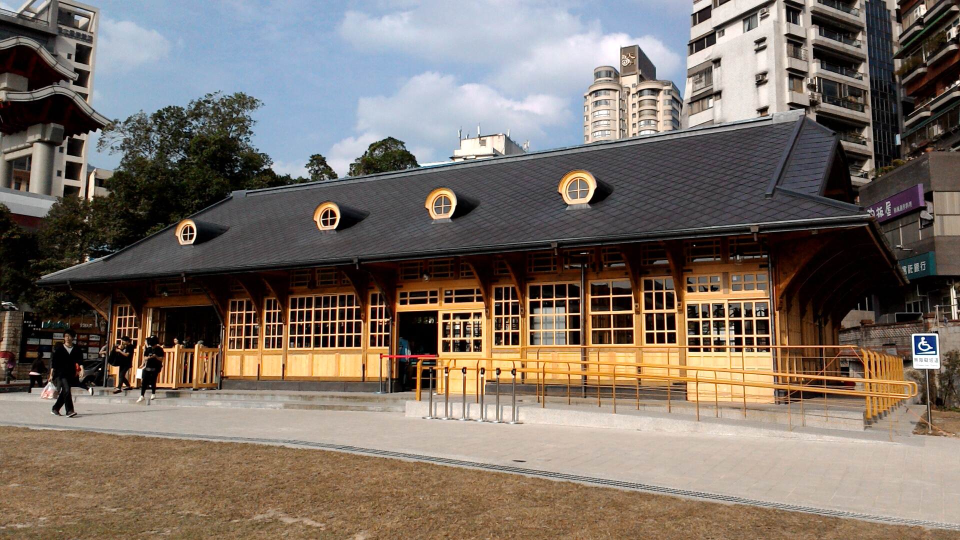 台鐵新北投車站背面,台北市北投區新北投次分區中心里